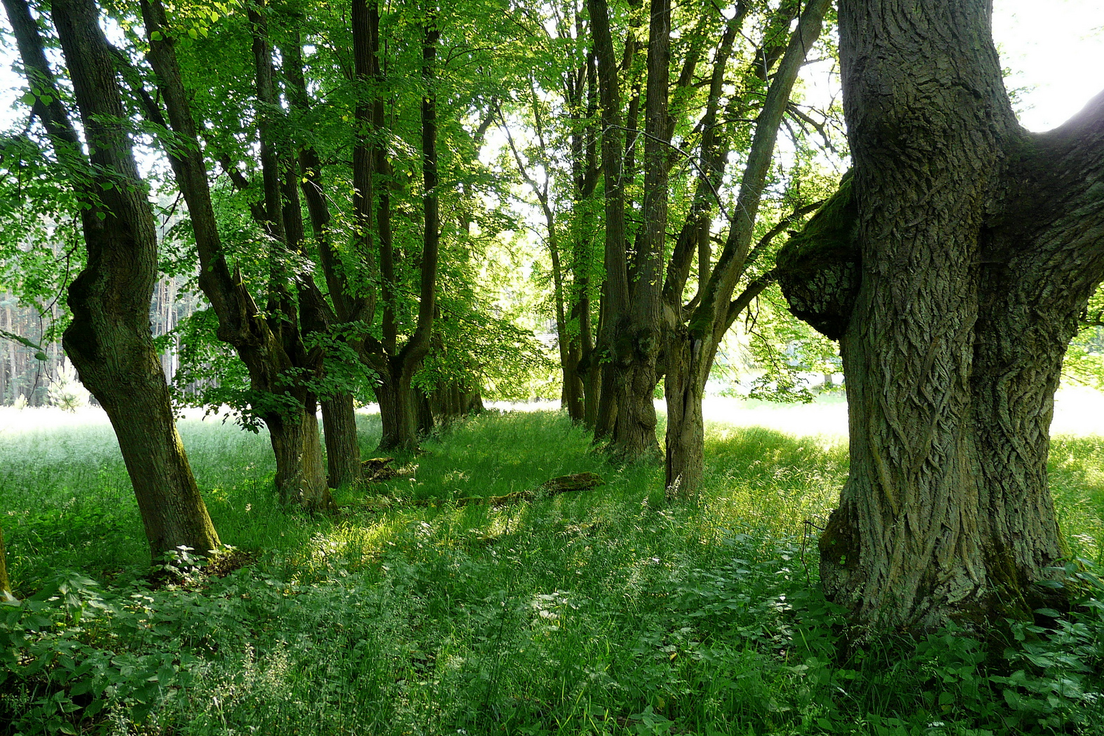 Alej na Valdštejnsku